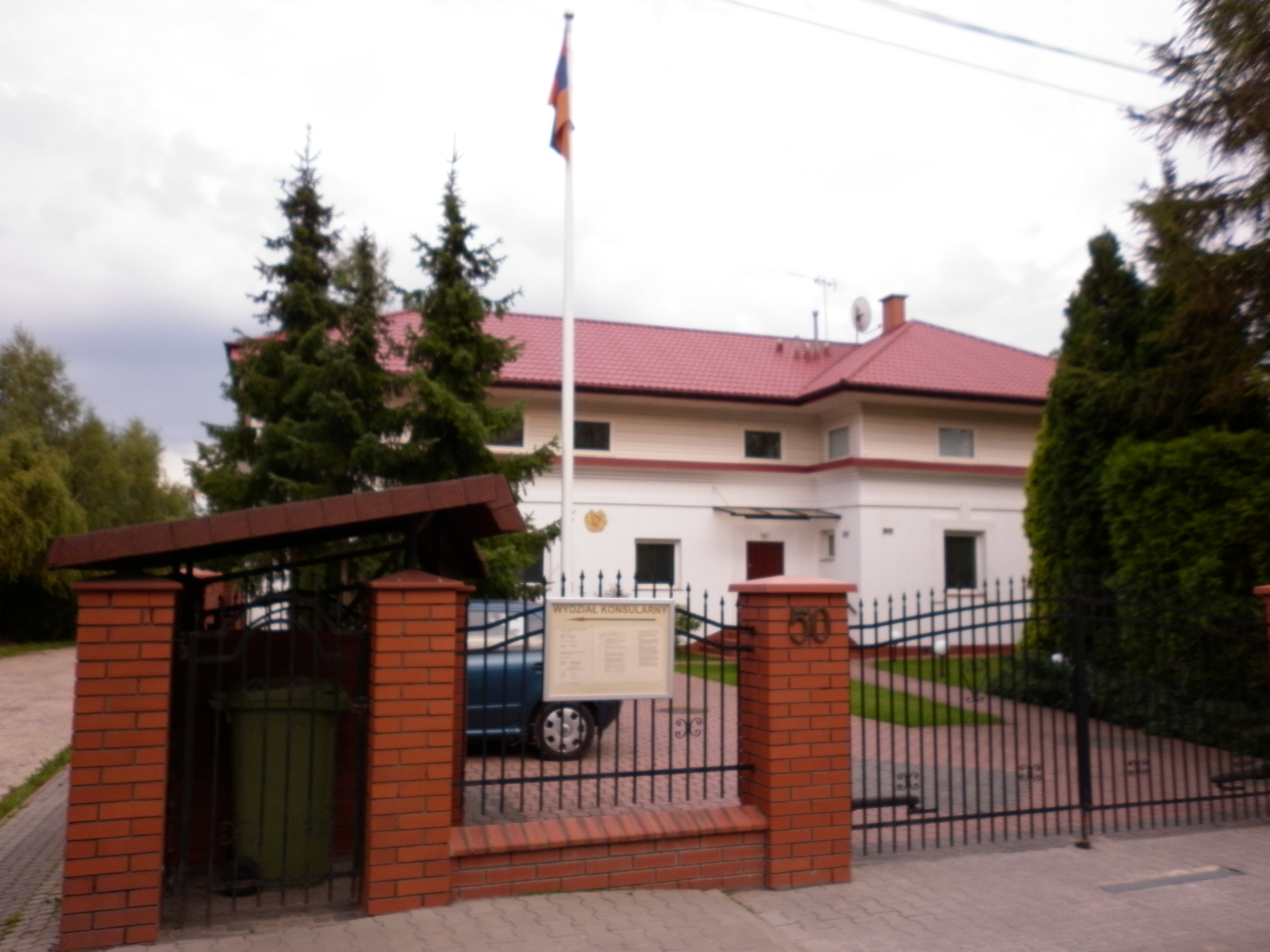 Ambasada Republiki Armenii